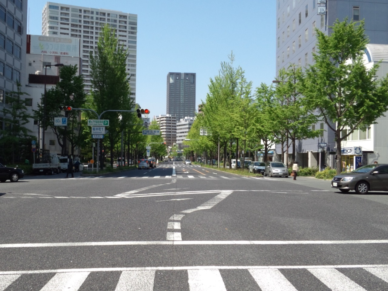 なにわ筋・靱本町一交差点